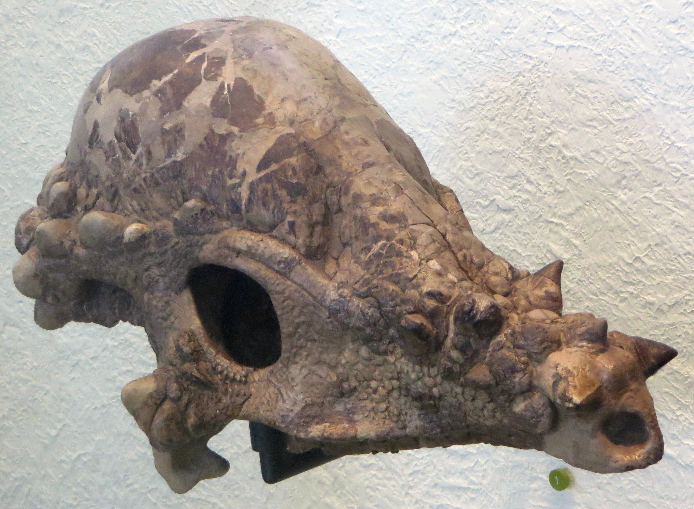 Pachycephalosaur Skull